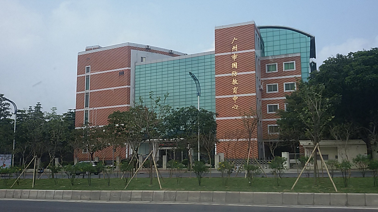 粵語: 廣州市國防教育中心